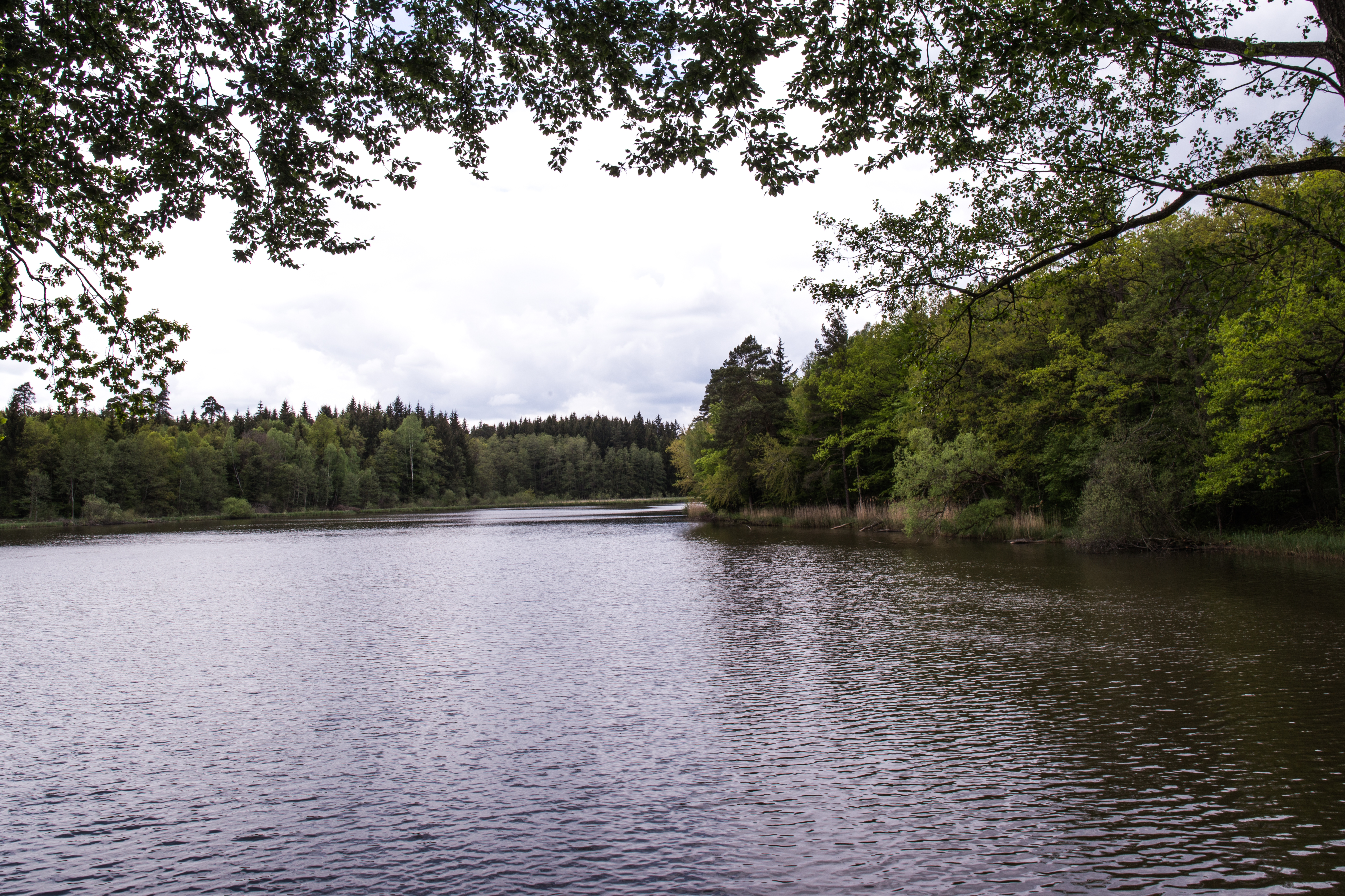 (NSG:BW-1.258)_Muckental